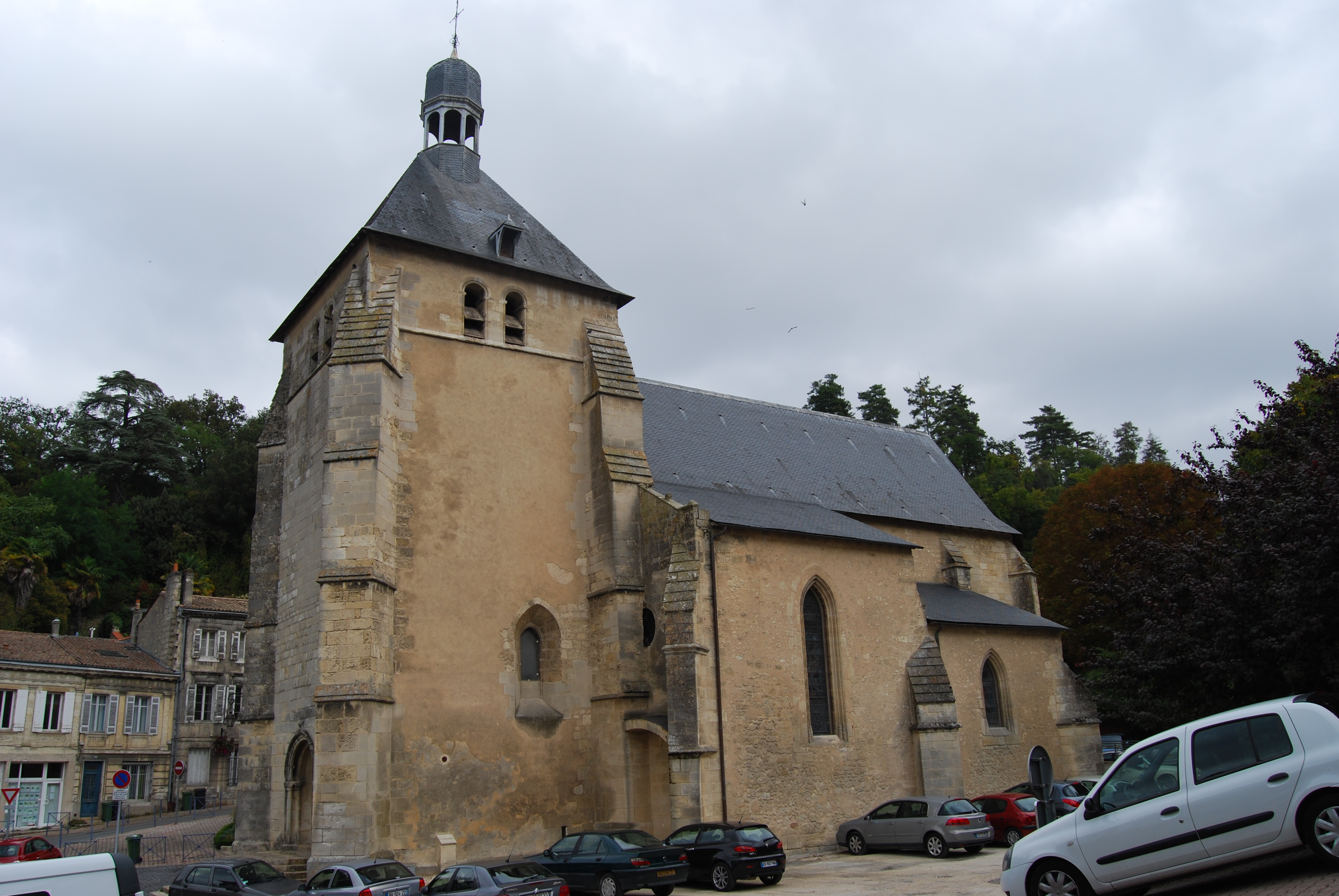 Église Saint-Martin de Lormont, (Inscrit, 1925) .